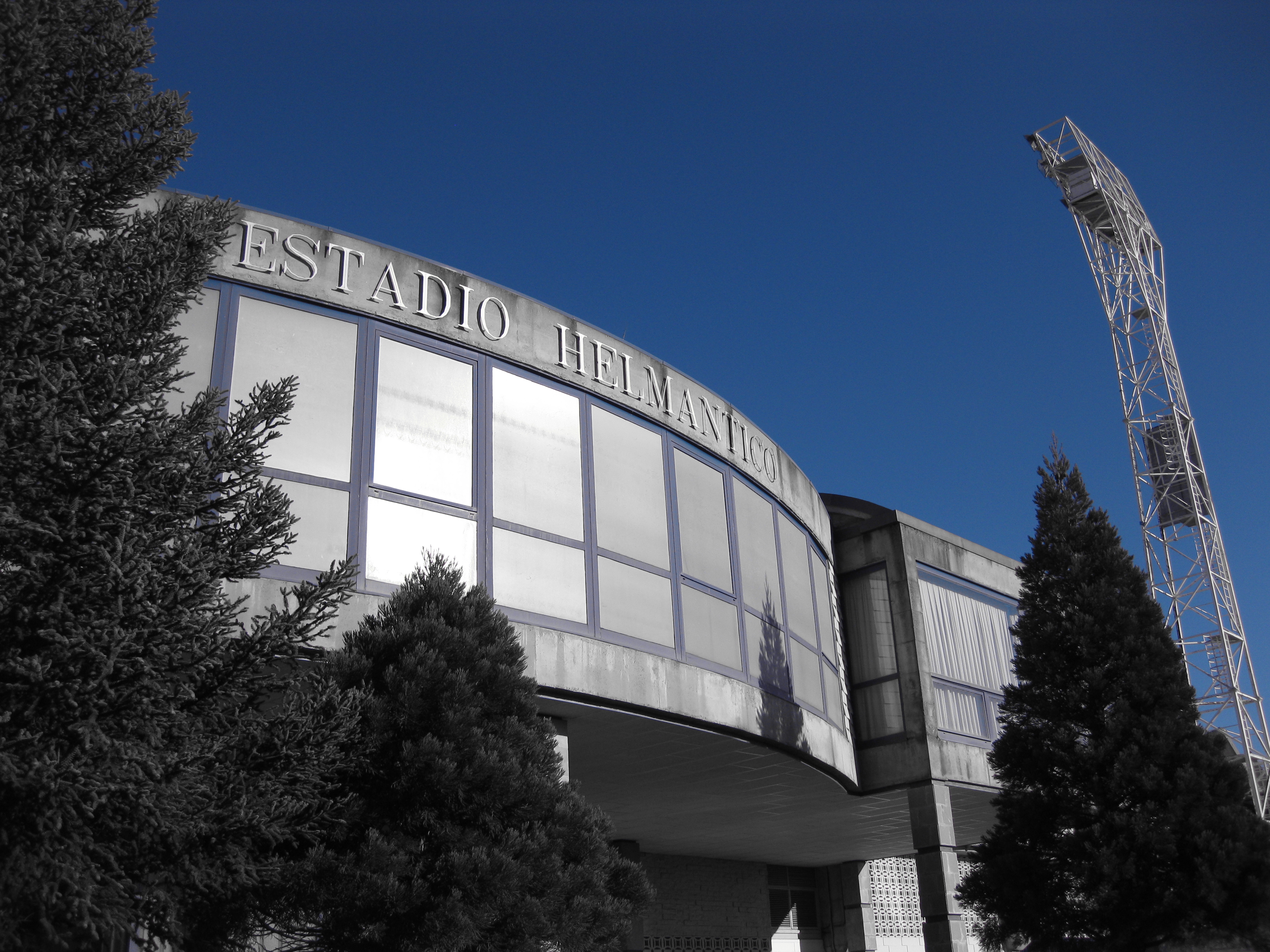 Campo de futbol Helmantico (Salamanca, España)